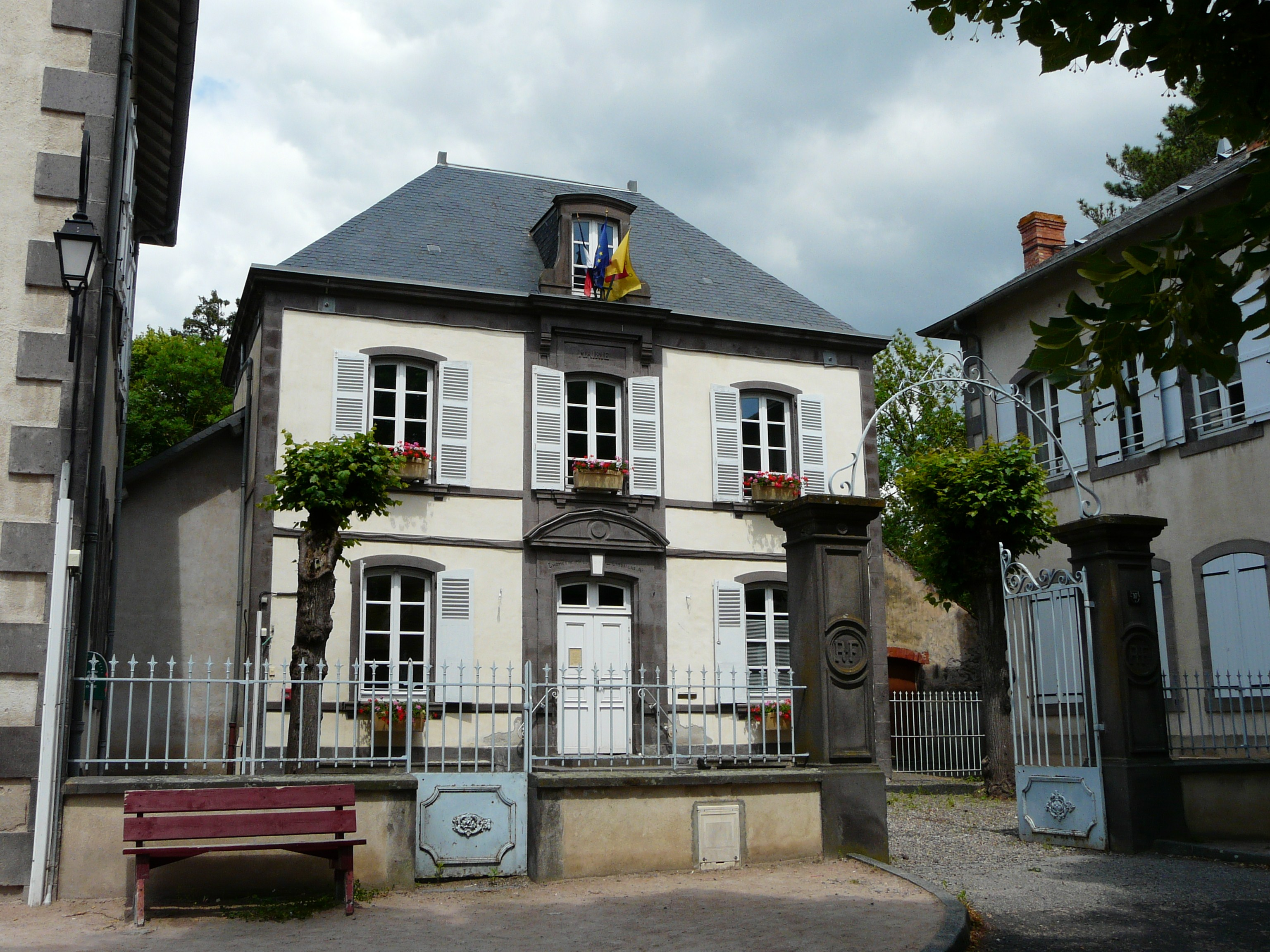 La mairie de Saint-Saturnin, Puy-de-Dôme, France.